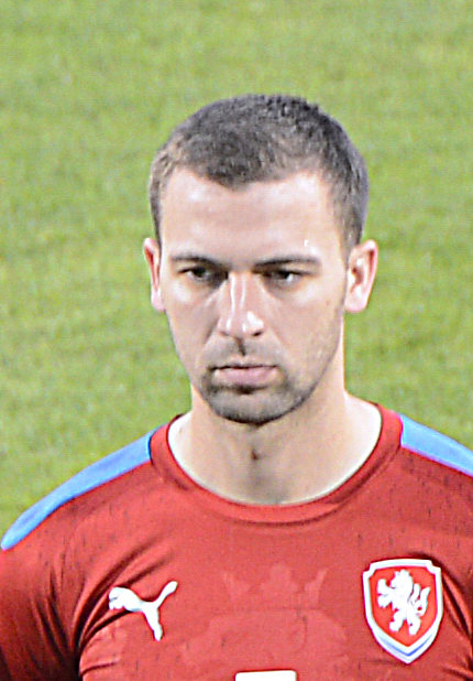 Mezinárodní fotbalový zápas Česko - Rakousko v Olomouce